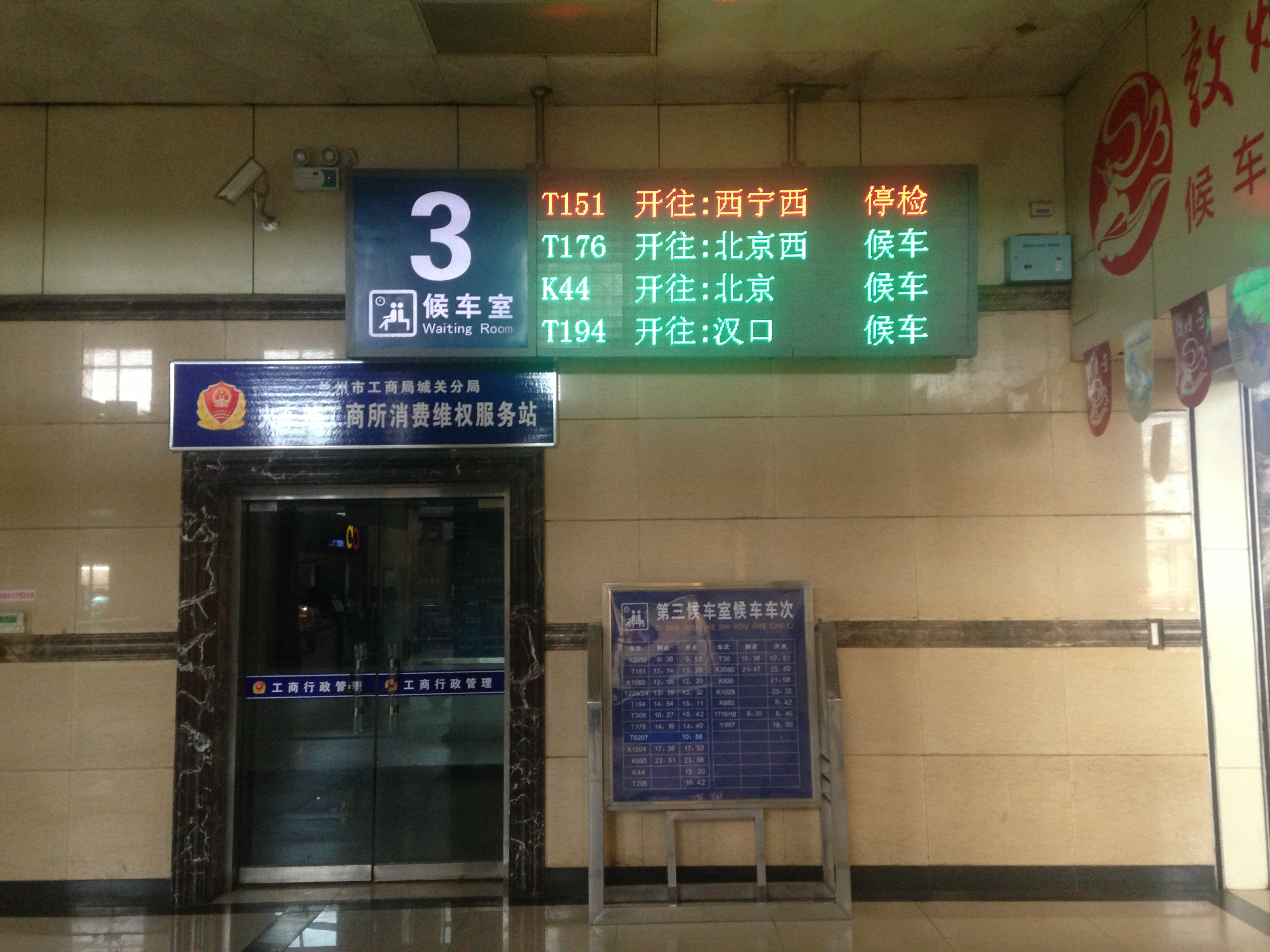 乘坐K44次列车的旅客需在兰州站2楼第三候车室候车